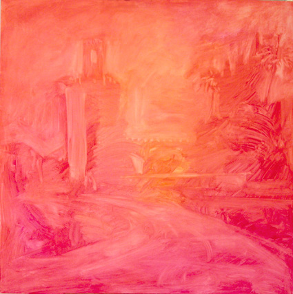 "Torre de Espantaperros", serie "Al Islam" del artista Pedro Roque Hidalgo. Acrílico sobre tabla 122x122 cm.